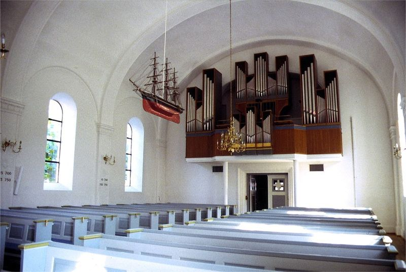 Søborg Kirke i Danmark. Skibet set mod nordøst